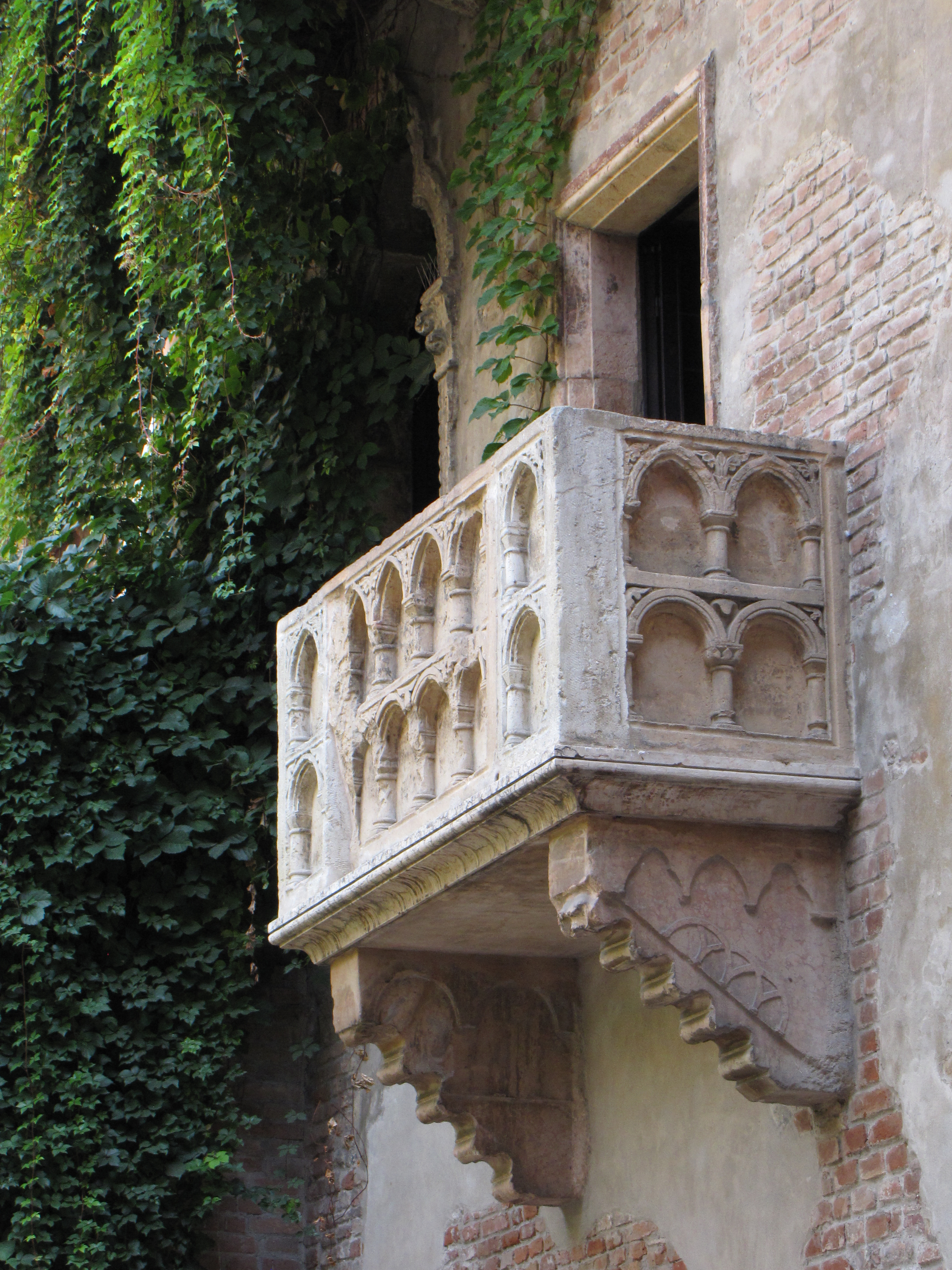 Il cosiddetto "Balcone di Giulietta", nel "palazzo di Giulietta" (in realtà, Palazzo Cappelletti) a Verona. Zelf gemaakte foto